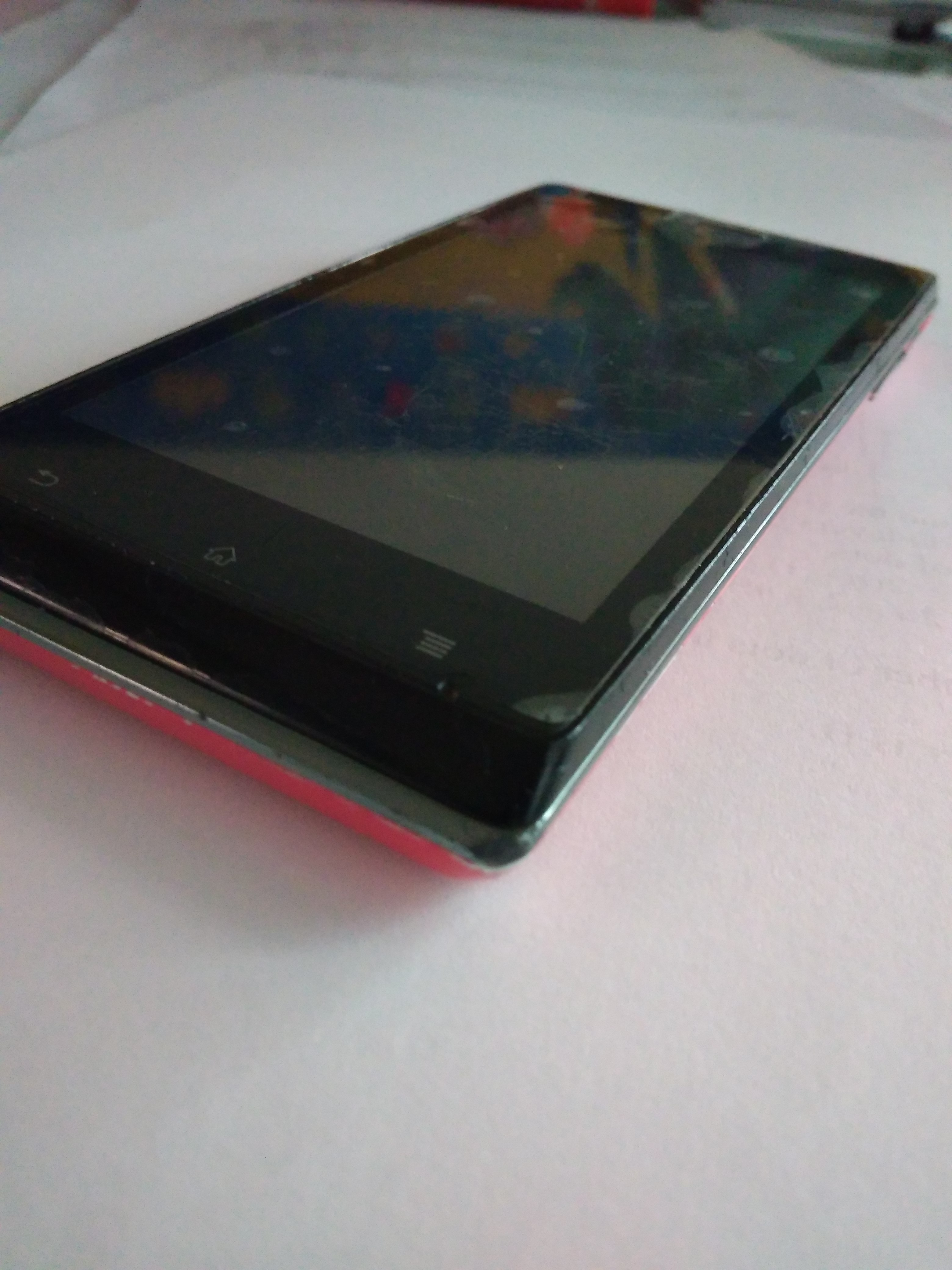 正面